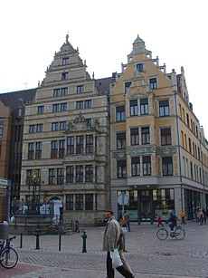 Das Leibnizhaus (links) in Hannover